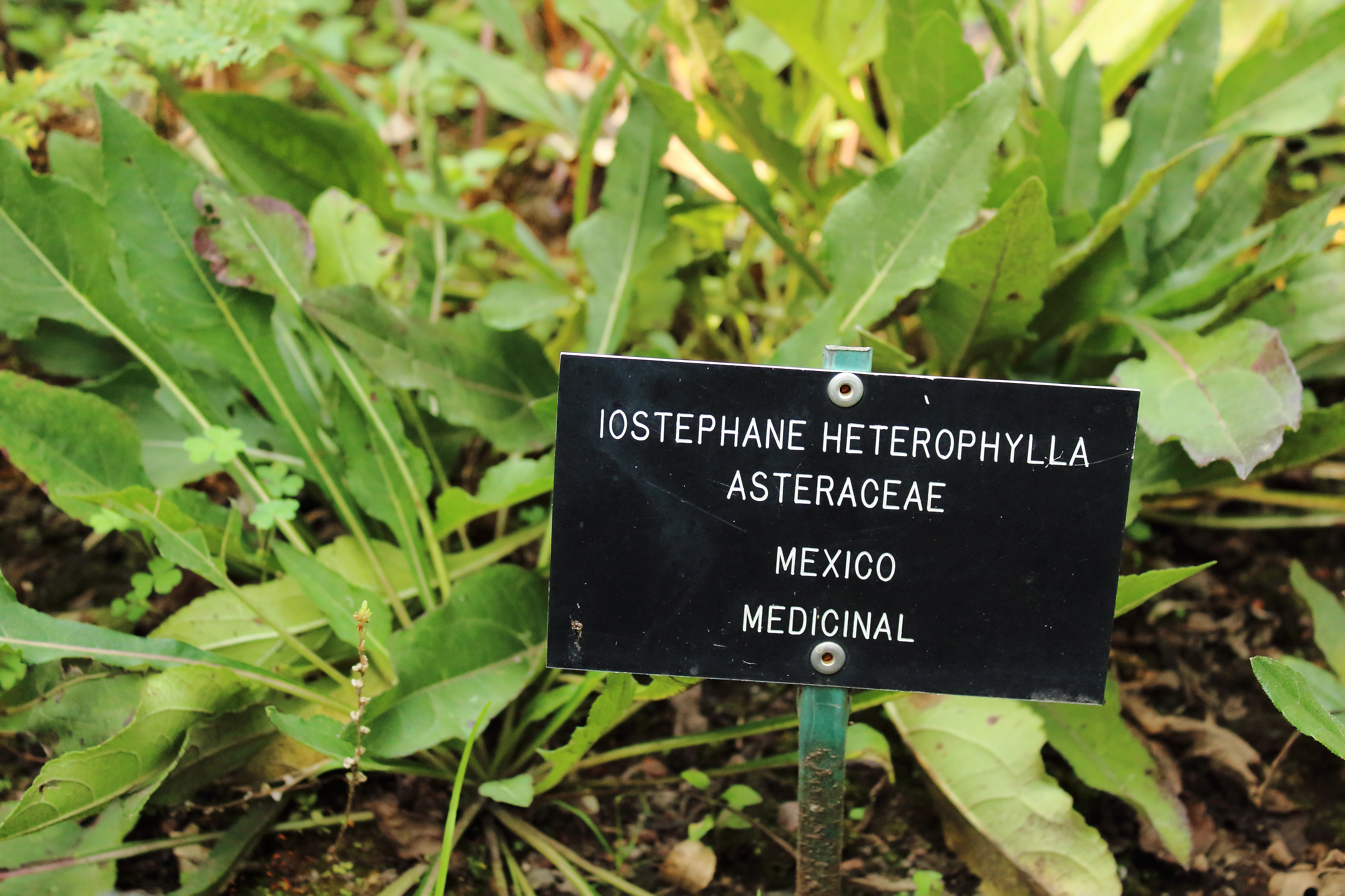 Breve descripción sobre la Iostephane heterophylla en el jardín botánico de la UNAM, México.